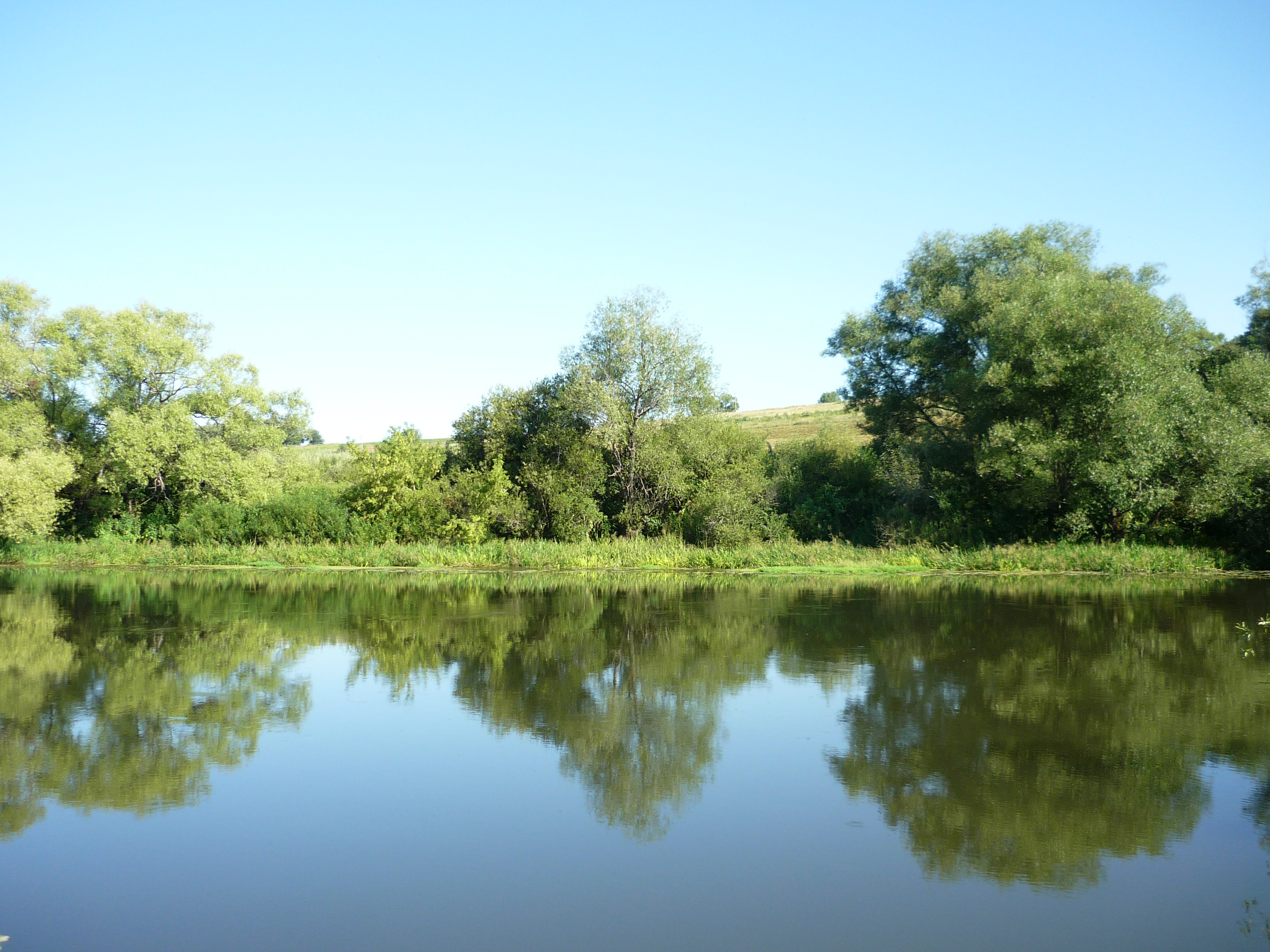 Серебрянные караси, пойманные на обыкновенную поплавочную удочку в деревенском пруду.